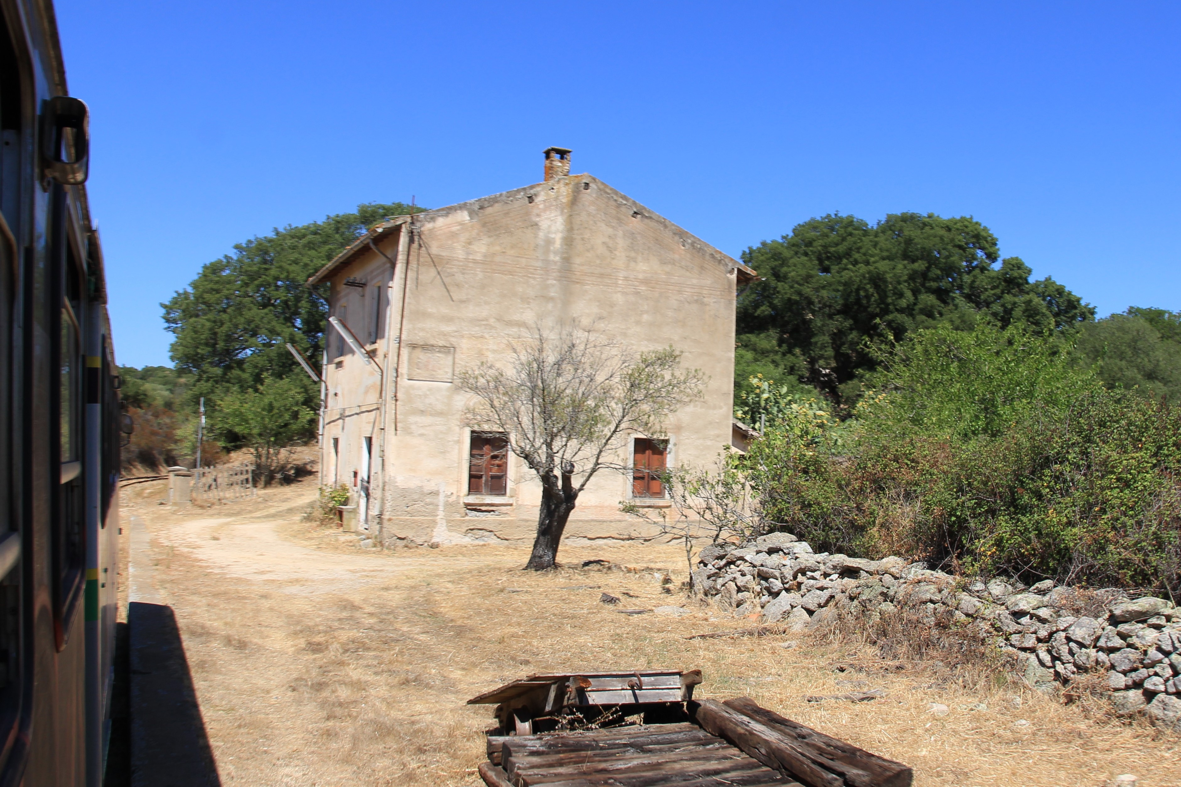 Sant'Antonio di Gallura, stazione ferroviaria di Rio Piatto